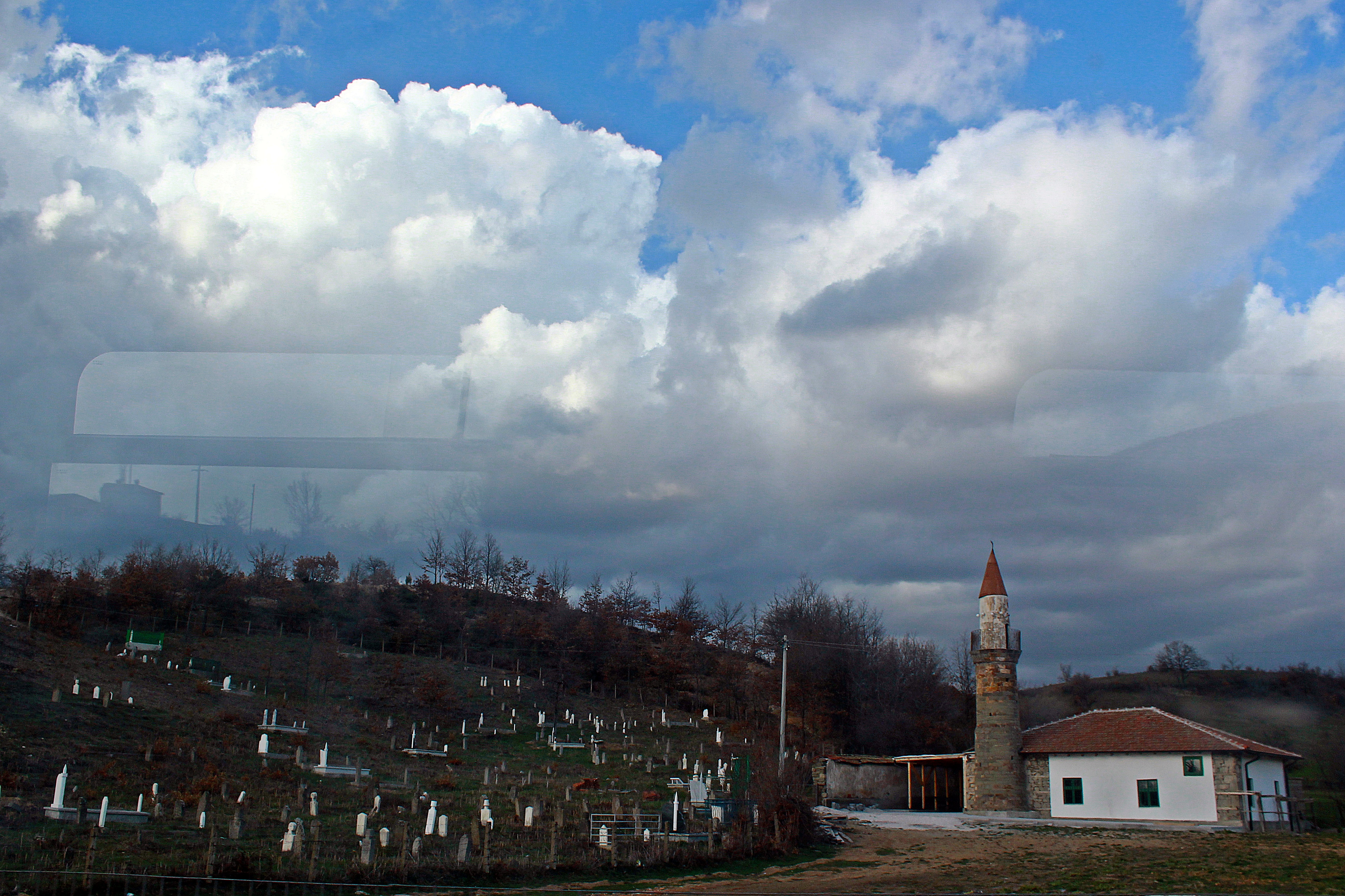 Xhamia në Vllahi